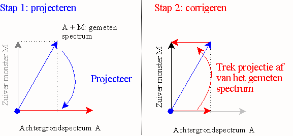 Deze figuur stelt achtergrondsubtractie of subtractie van een chemische interferent in een spectrum voor. Door middel van projectie van een gemeten spectrum op een zuiver achtergrondspectrum of het spectrum van de interferent, bepaalt men de bijdrage van de achtergrond of interferent in het gemeten spectrum (de vector parallel met de achtergrondvector is de bijdrage van het gemeten spectrum dat niet kan onderscheiden worden van de achtergrond: men neemt dan ook aan dat dit de zuivere achtergrond is). Deze bijdrage trekt men vervolgens af van het gemeten spectrum.